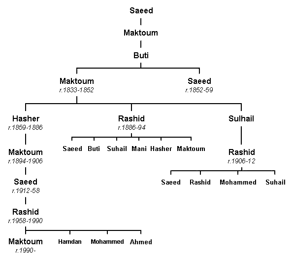 genealogical tree